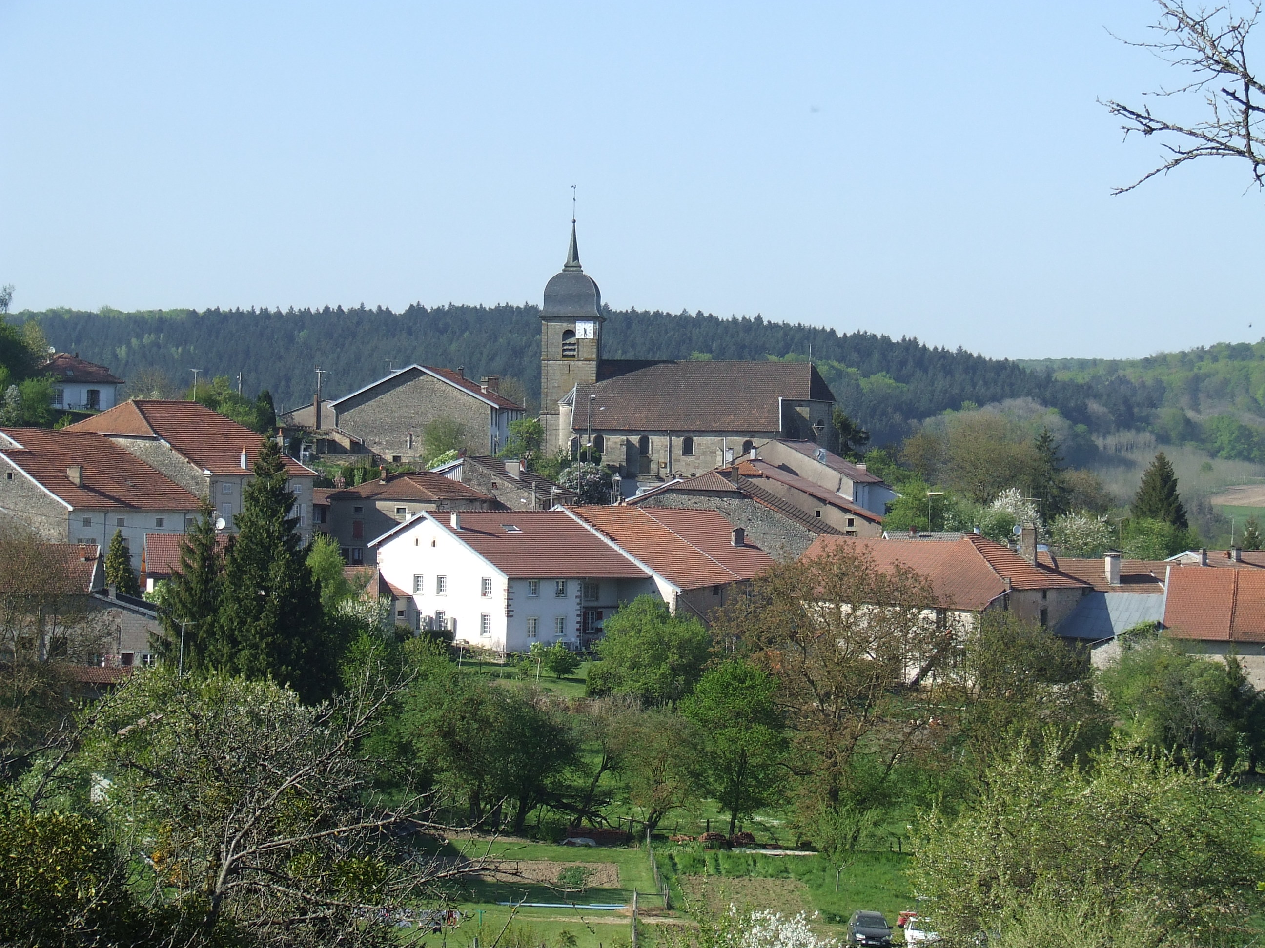 Vue de Bleurville (Vosges)